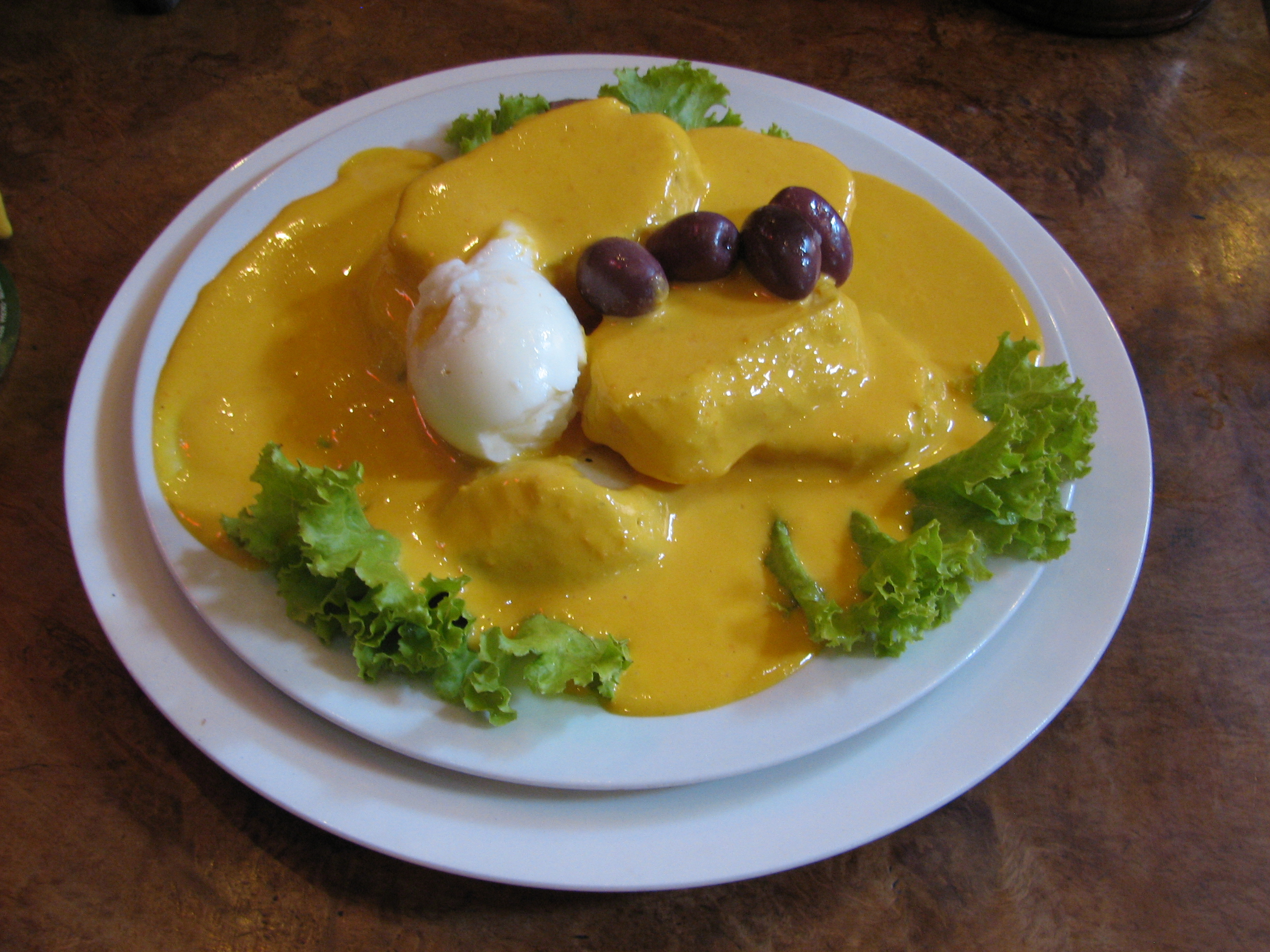 Papa a la huancaína